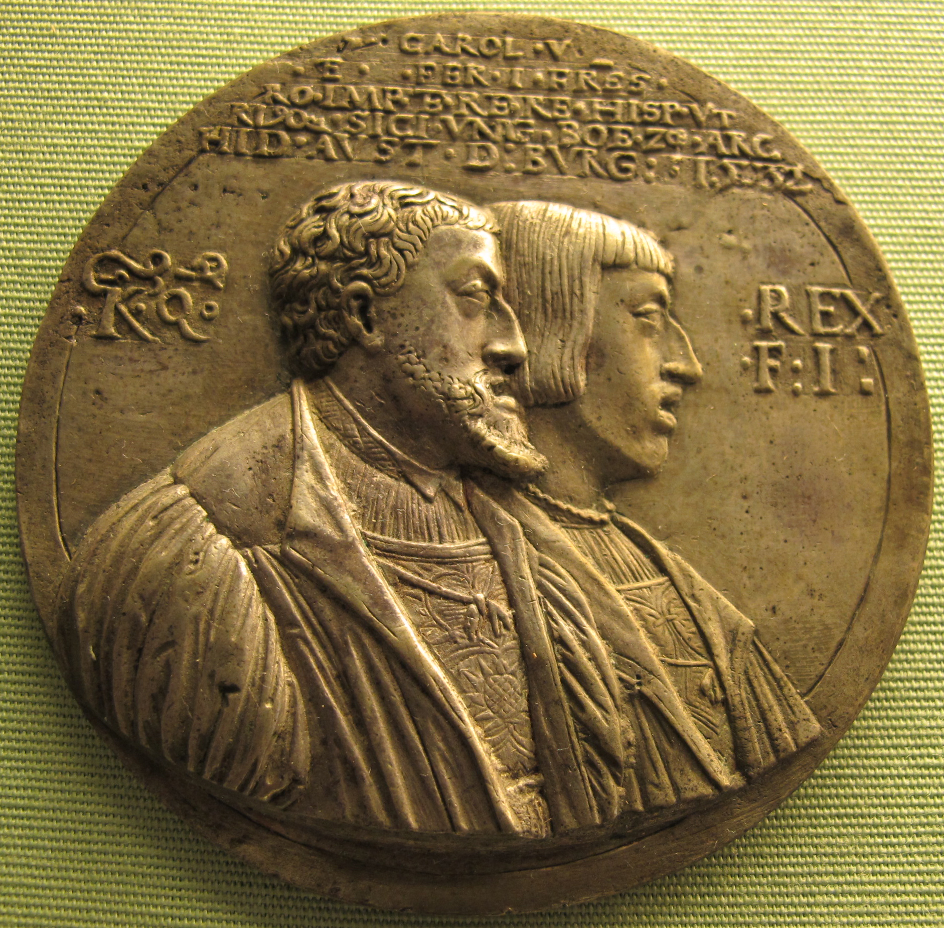 Peter flötner (attr.), carlo V e ferdinando I, 1532